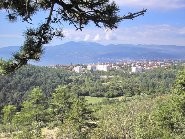 Pogled na drenovu sa velog Vrha